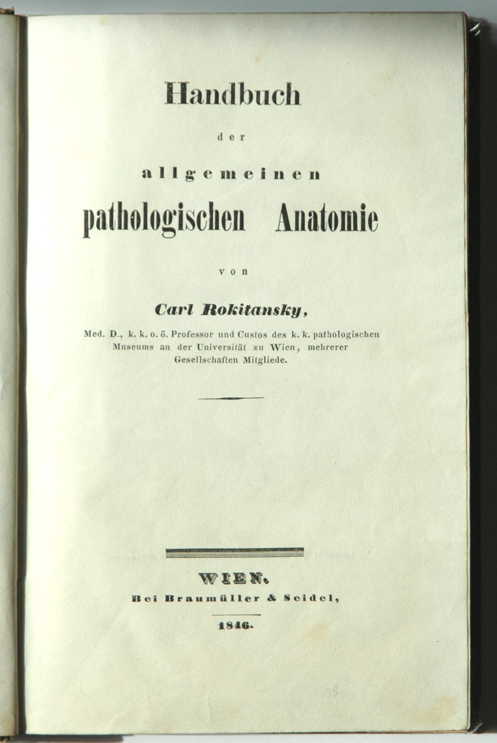 Titelblatt des Erstdruckes